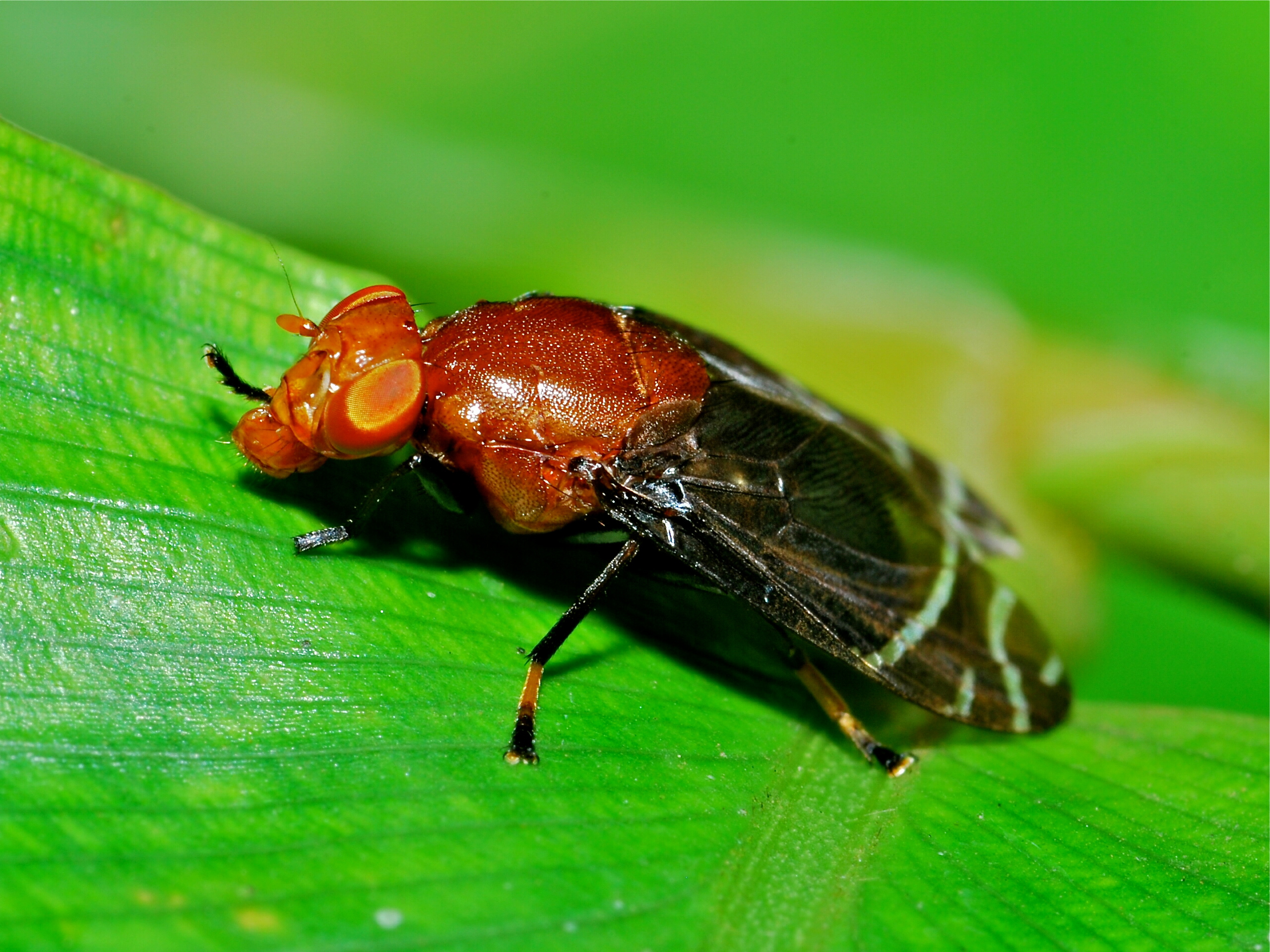 Mabira Forest, UGANDA